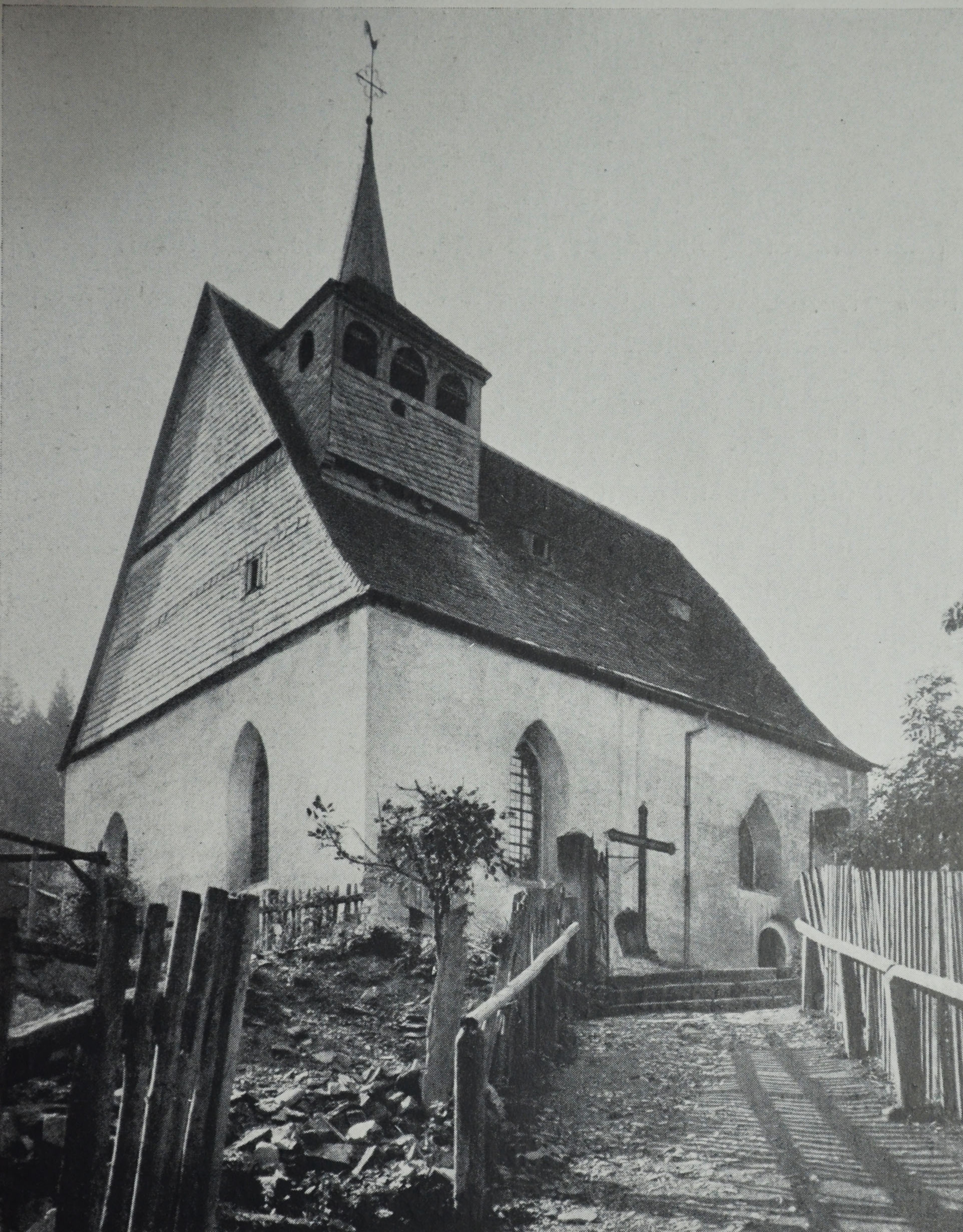 Alte Kirche in Padberg 1913